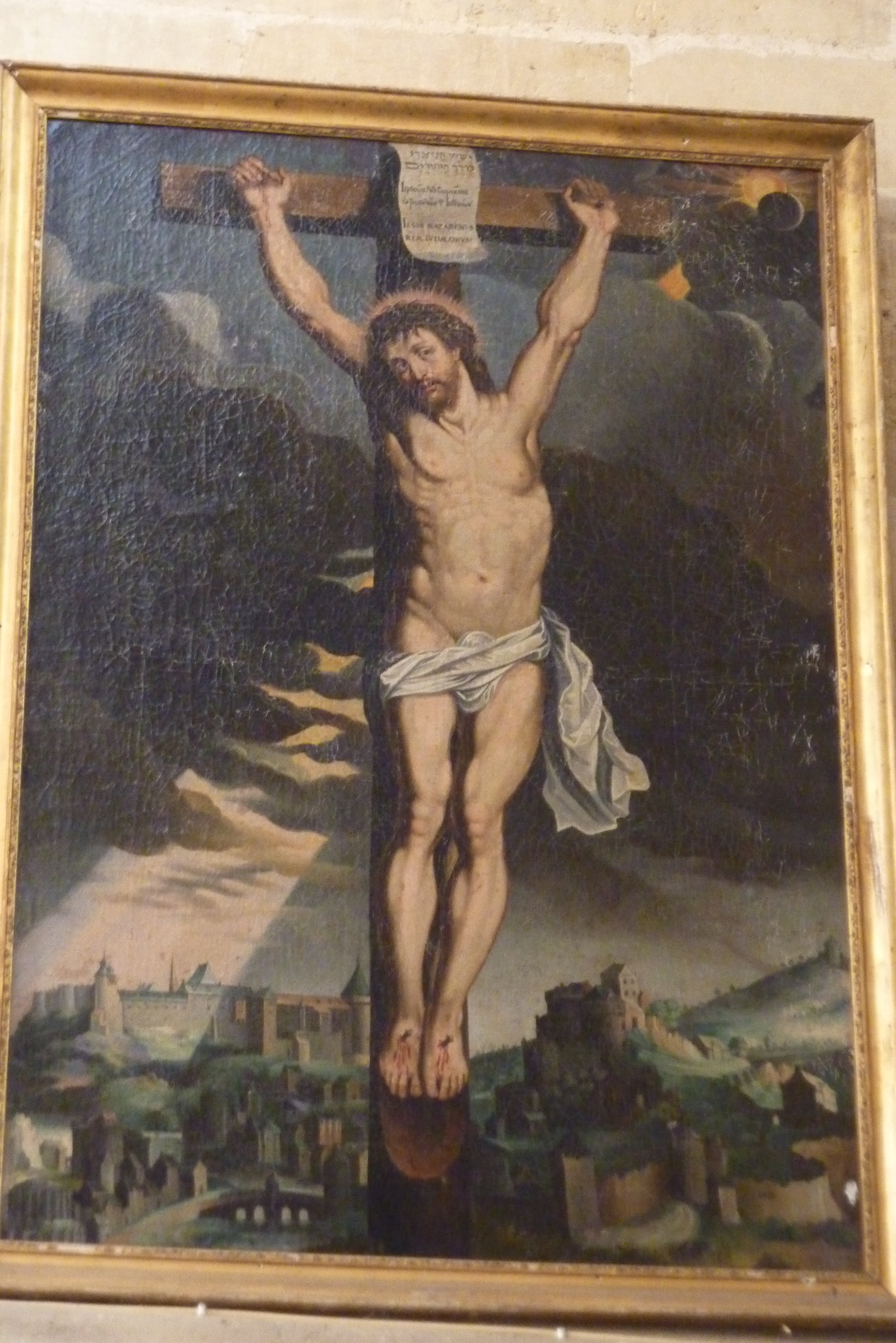 La Crucifixion ( XVII). Tableau situé dans le transept nord de l'église Saint-Étienne.